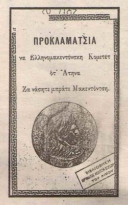 Прокламация на Елиномакедонския комитет в Атина, написана на български език с гръцки букви. Заглавие: "Прокламация на Елиномакедонски комитет от Атина. За нашите брате македонци".